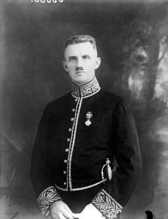 Repronegatief. Studioportret van C. Lulofs, de eerste resident in Nieuw-Guinea en de vader van schrijfster Madelon H. Székely-Lulofs